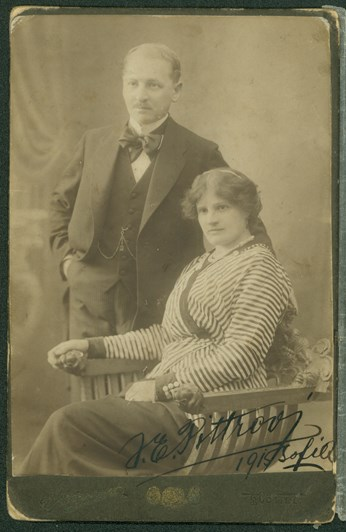 Снимка на професор Йосиф Питер, чех, преподавател в Рисувалното училище в София, със съпругата си.